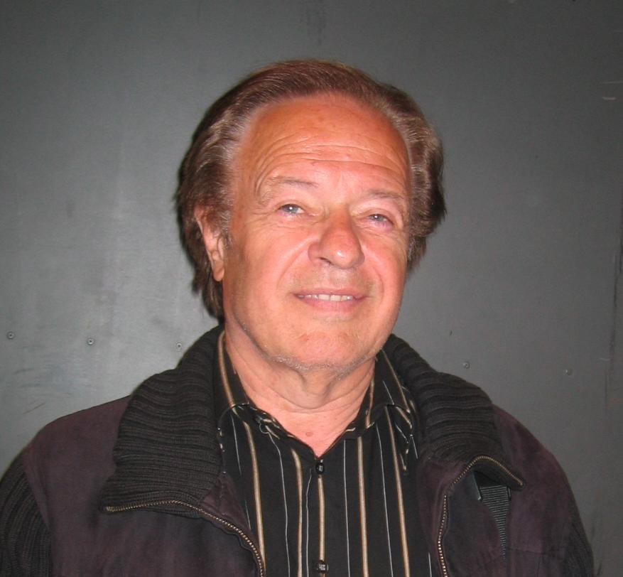 Alfi Nipič, slovenian singer